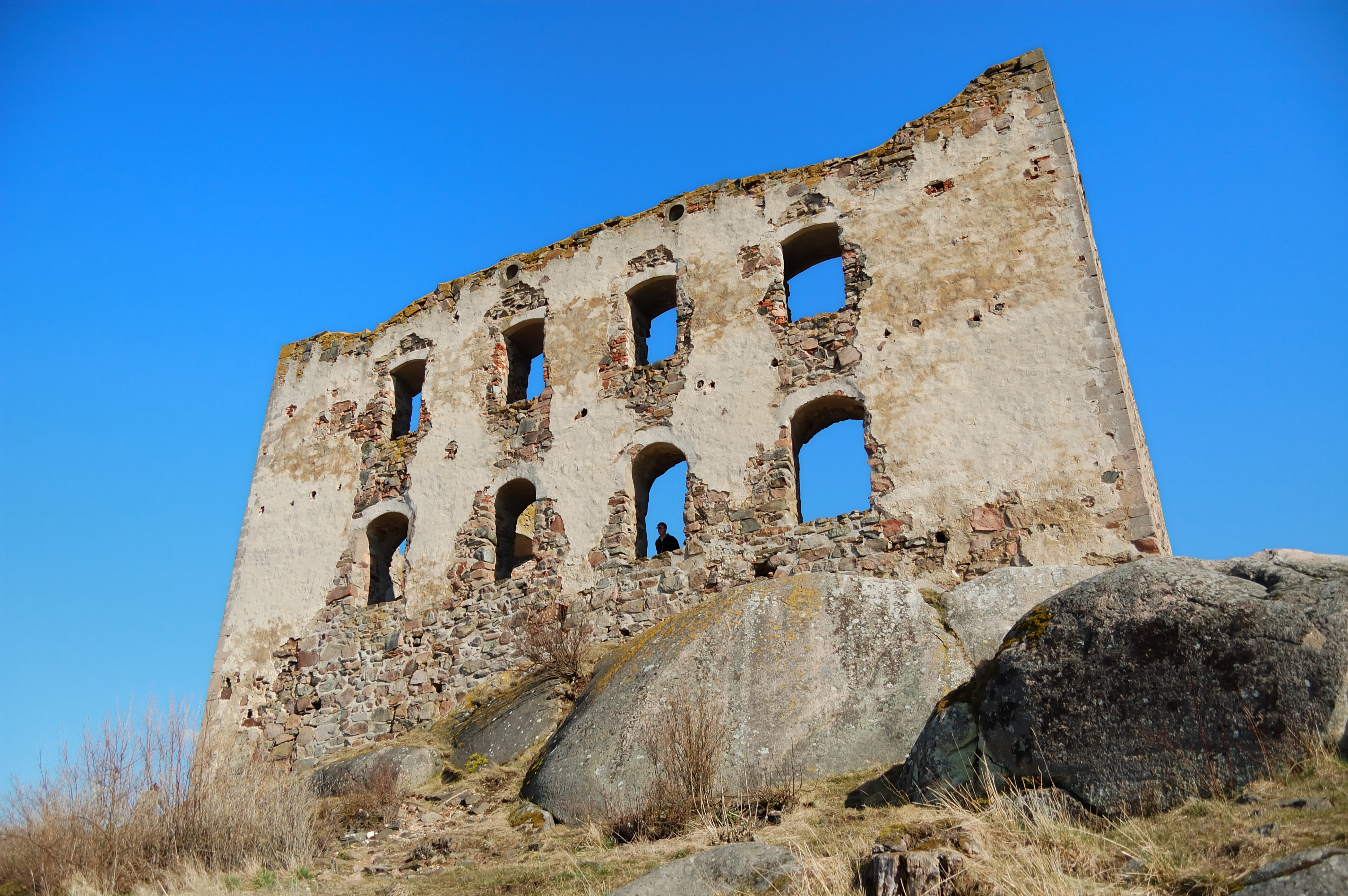 Brahehus